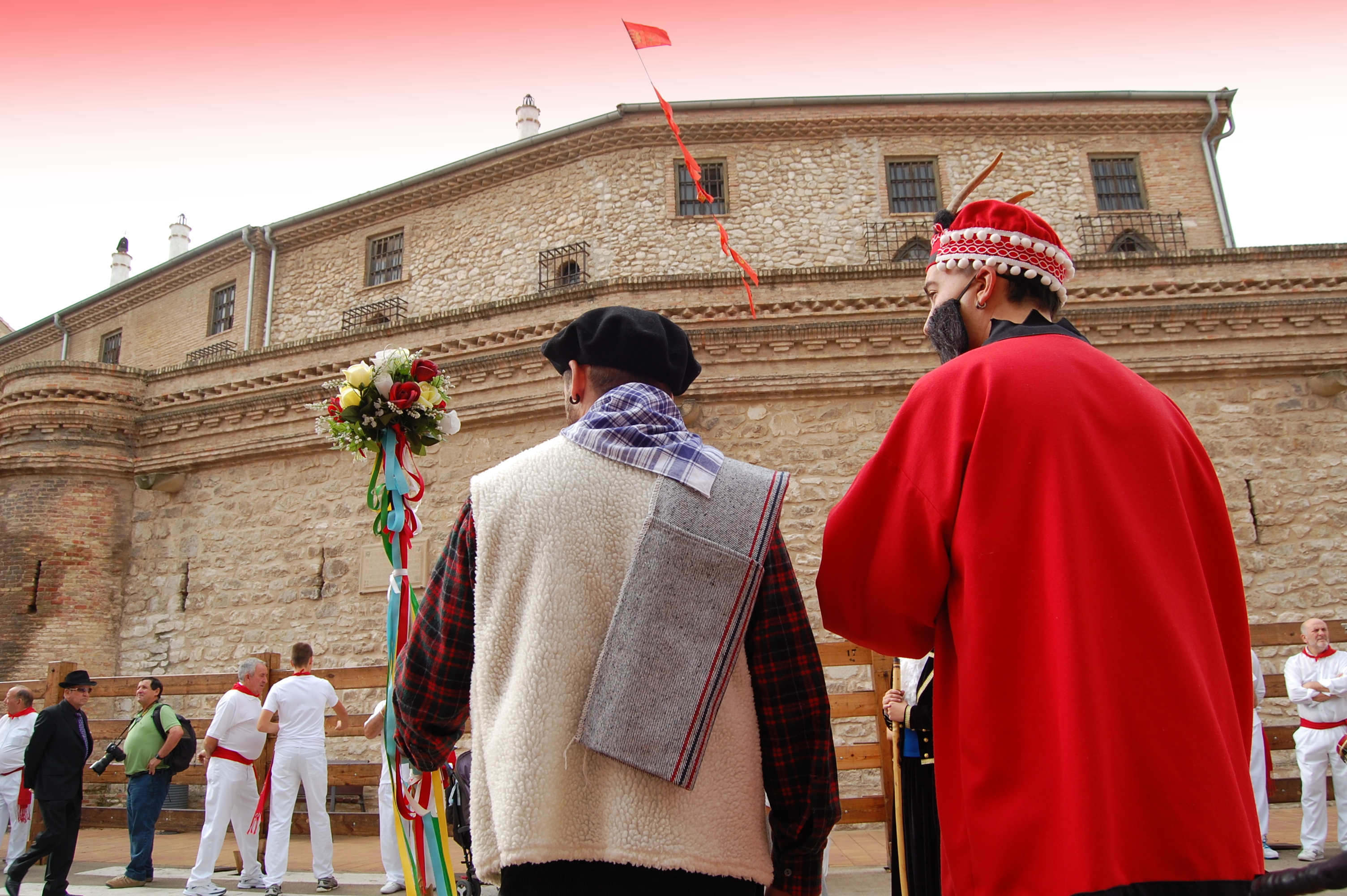 Castillo de Cortes en Cortes (Navarra) I.) - 51 - 0007018 - 00000 .